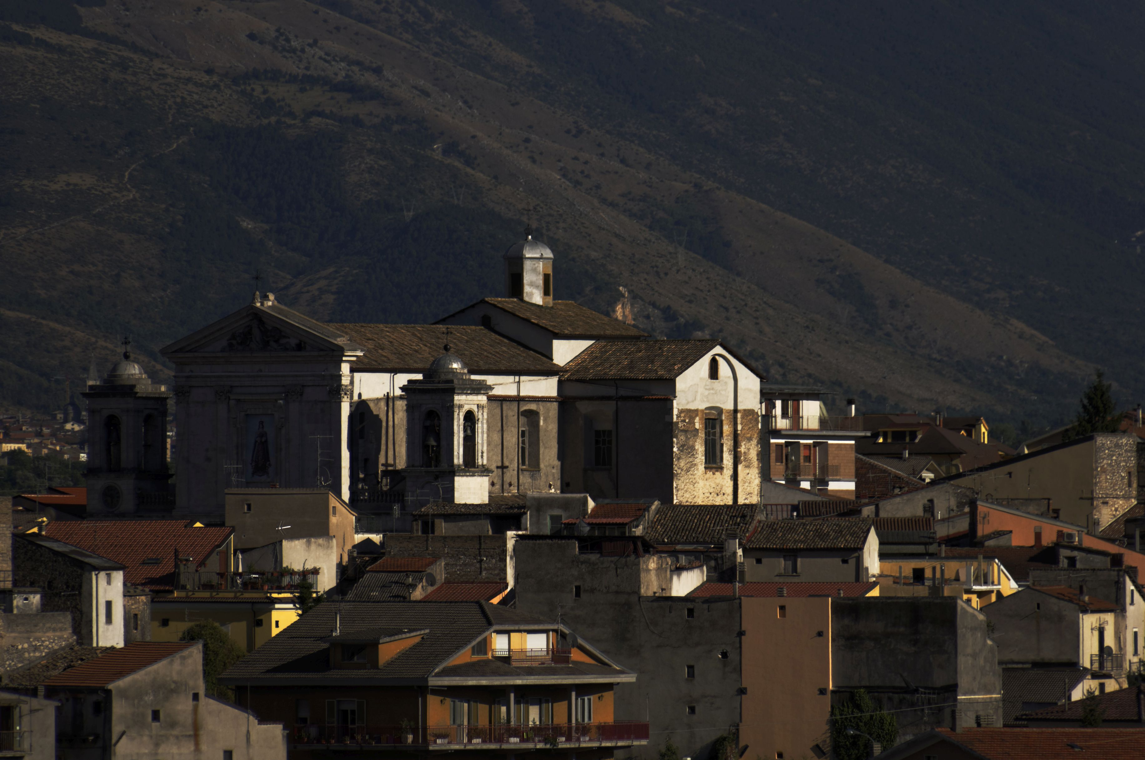 Pratola Peligna - 2017